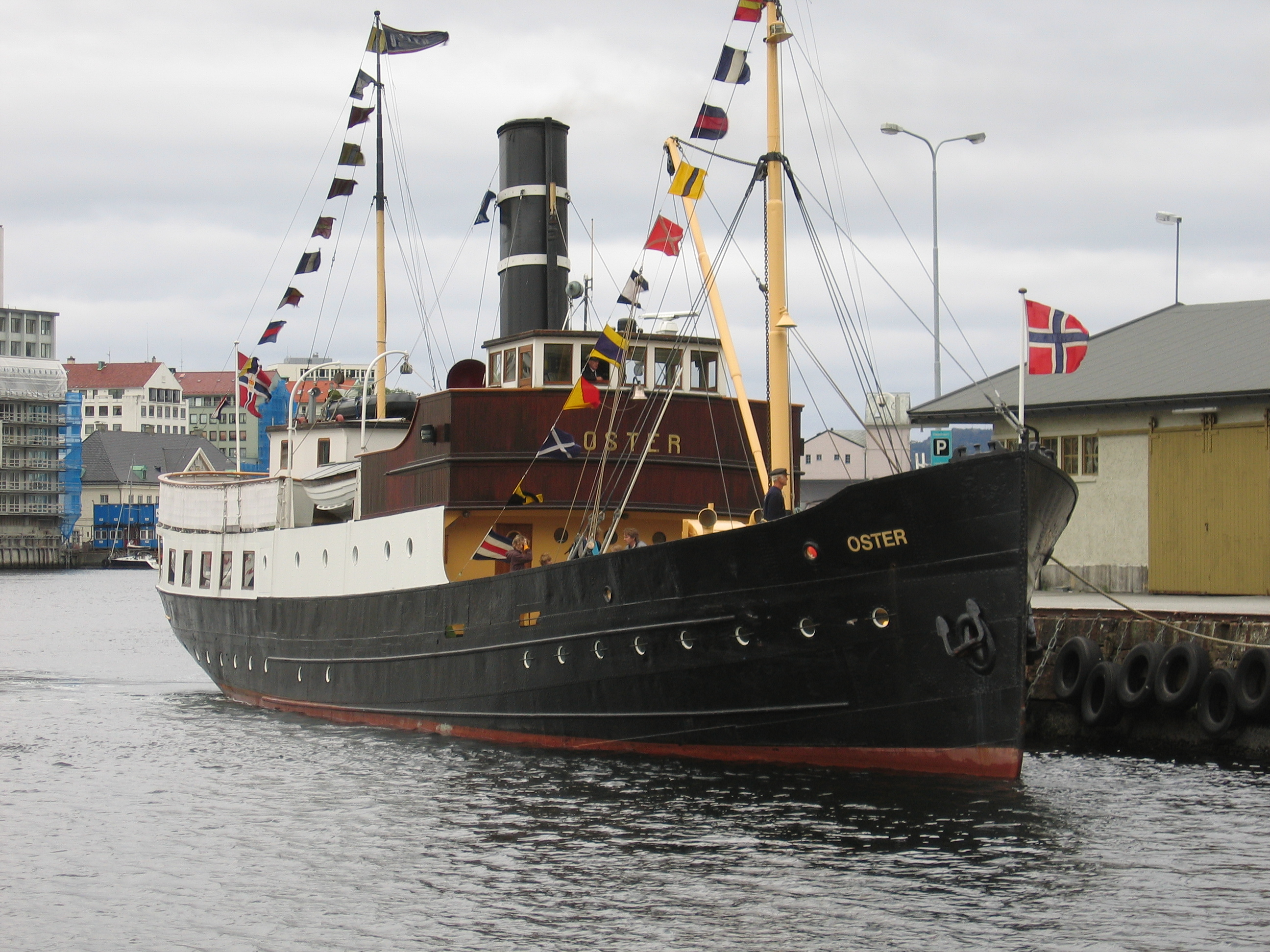 D/S Oster in Bergen harbour, Norway 2005.